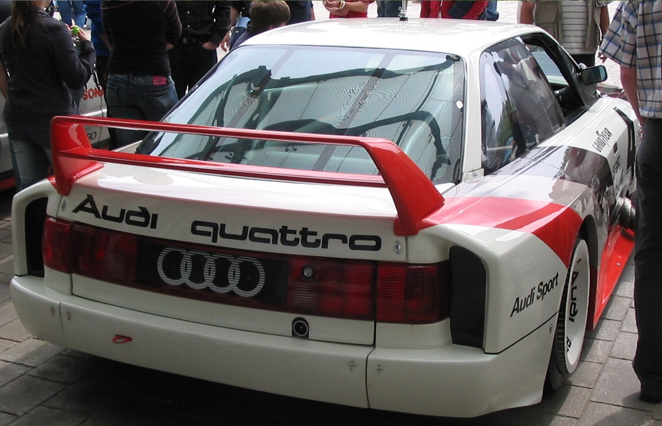 Audi 90 quattro IMSA GTO Heck mit 2 stöckigem Heckflügel